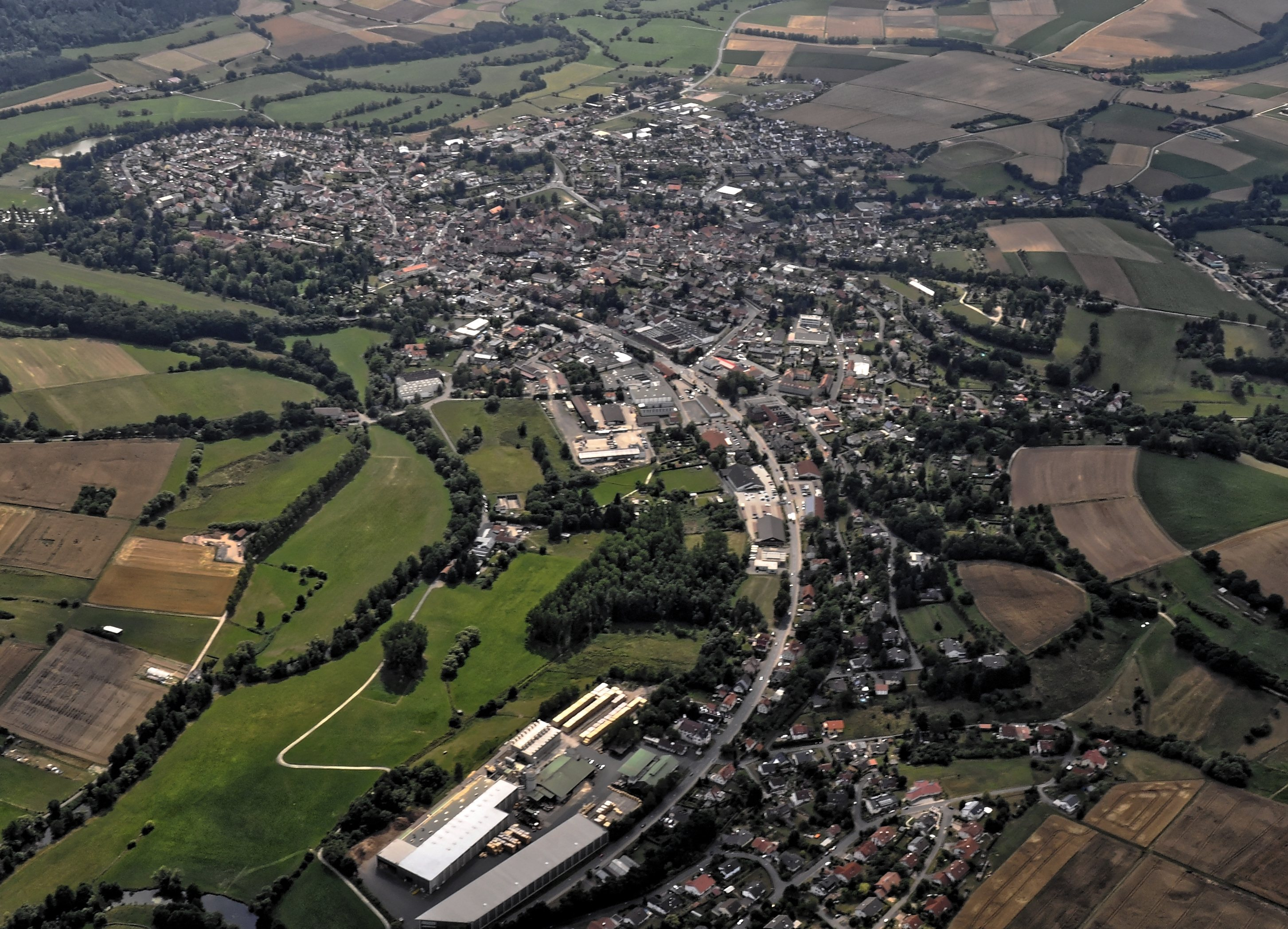 Bilder vom Flug Nordholz-Hammelburg 2015: Schlitz, Vogelsbergkreis